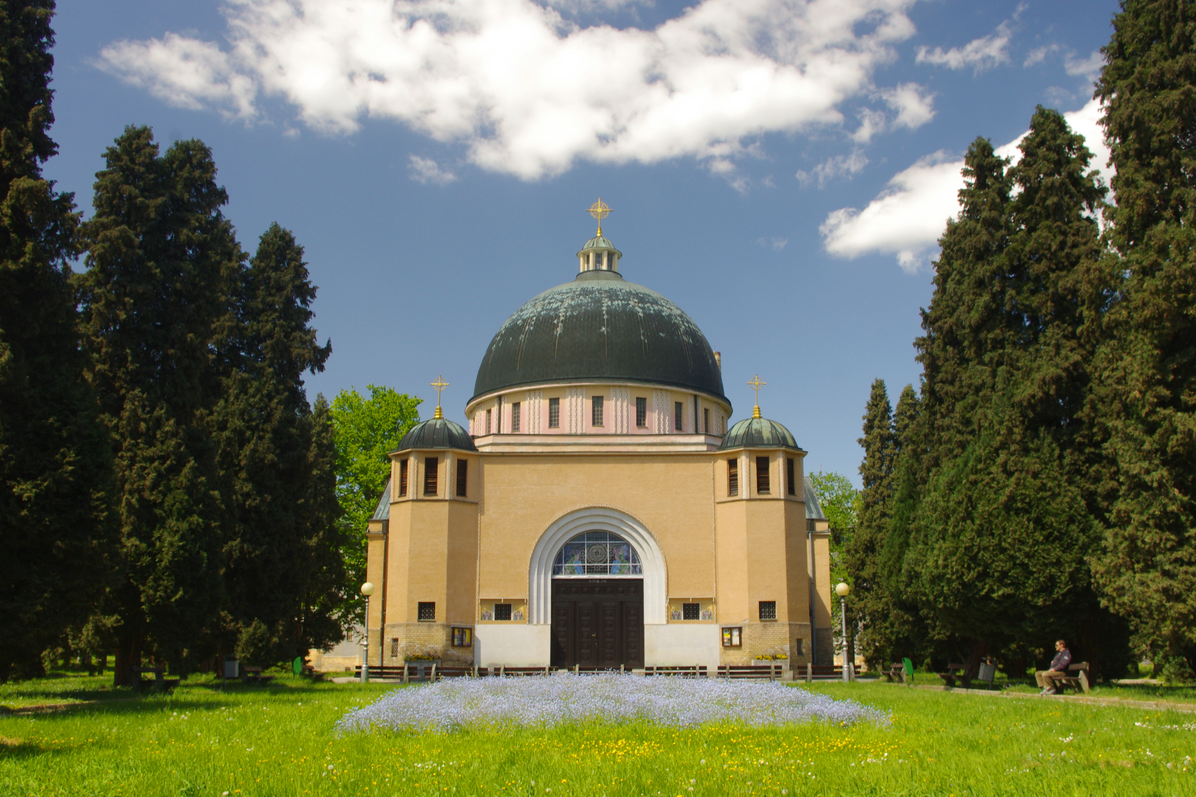 Nemocnice - psychiatrická léčebna (Kroměříž), Havlíčkova 1265/50, Kroměříž, Kroměříž.